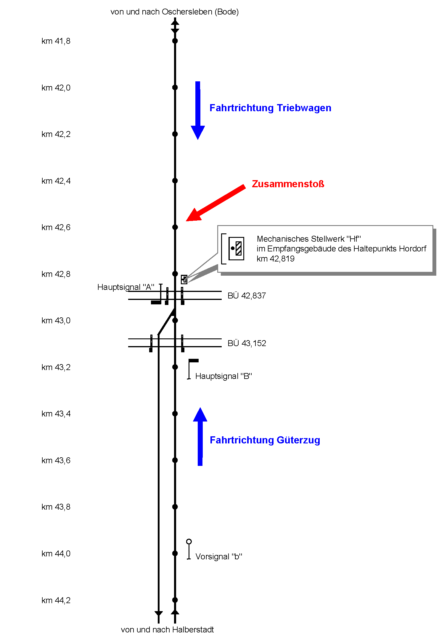 Skizze der Situation am Haltepunkt Hordorf.